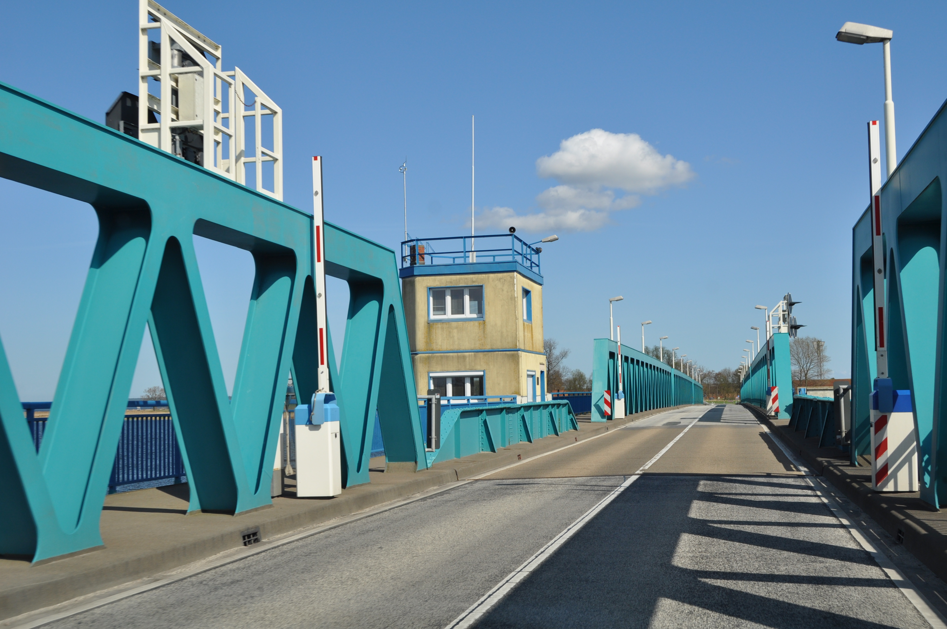 Zecheriner Brücke - Querung des Peenestromes